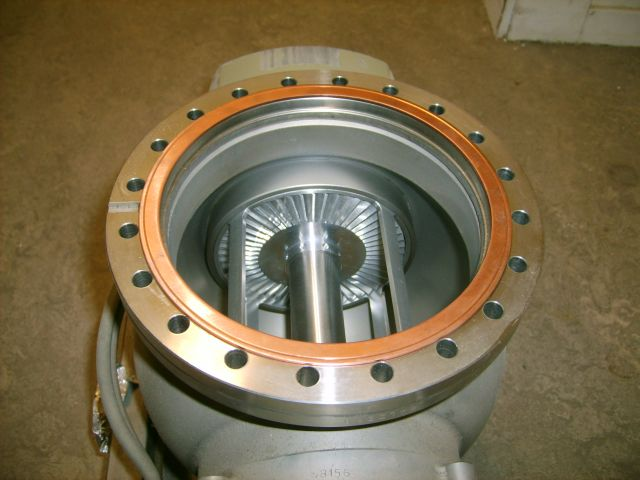 picture of a turbo vacuum pump